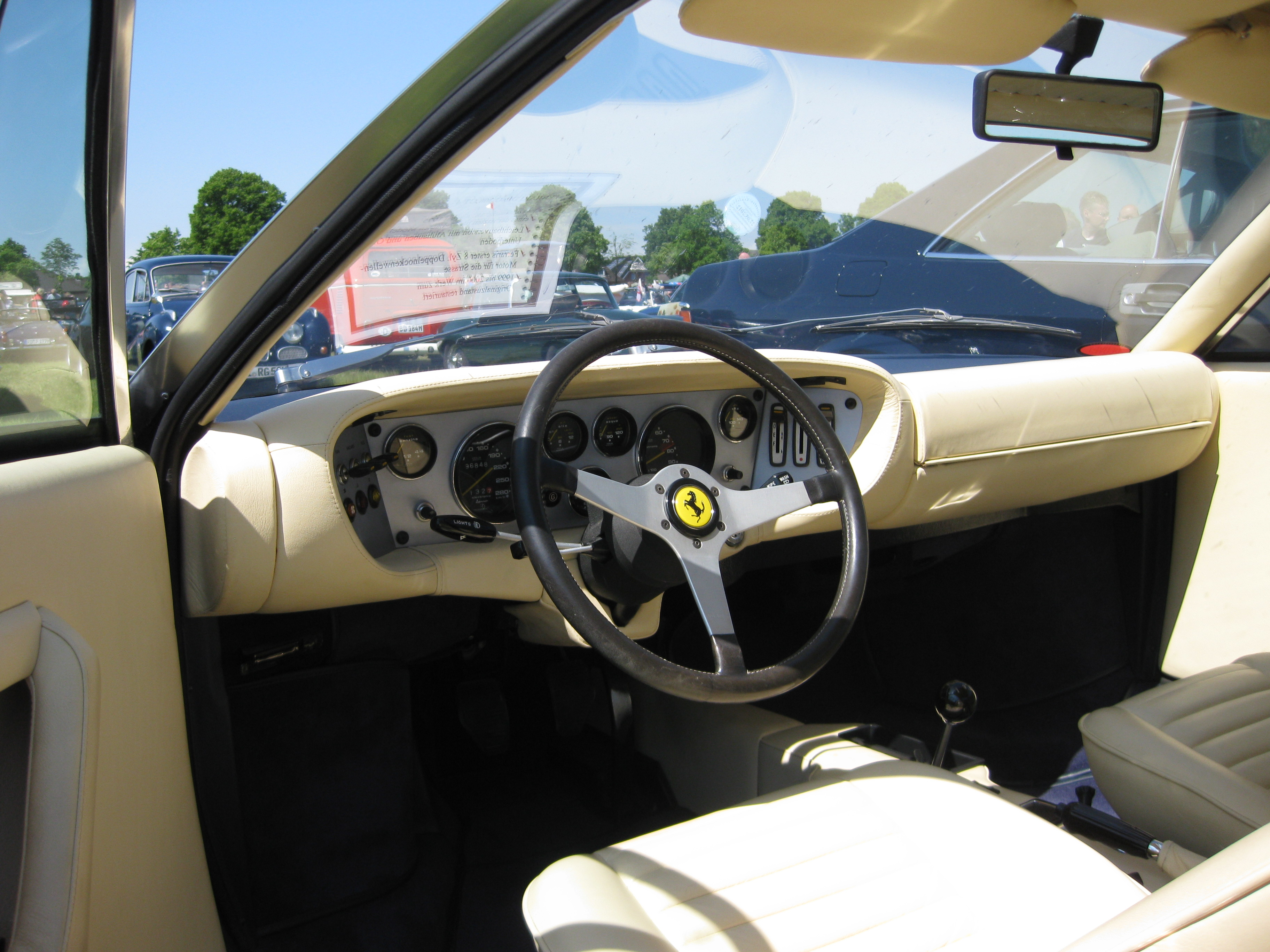 Dino 308 GT4